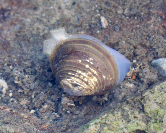 "mashijimi(Corbicula leana)"